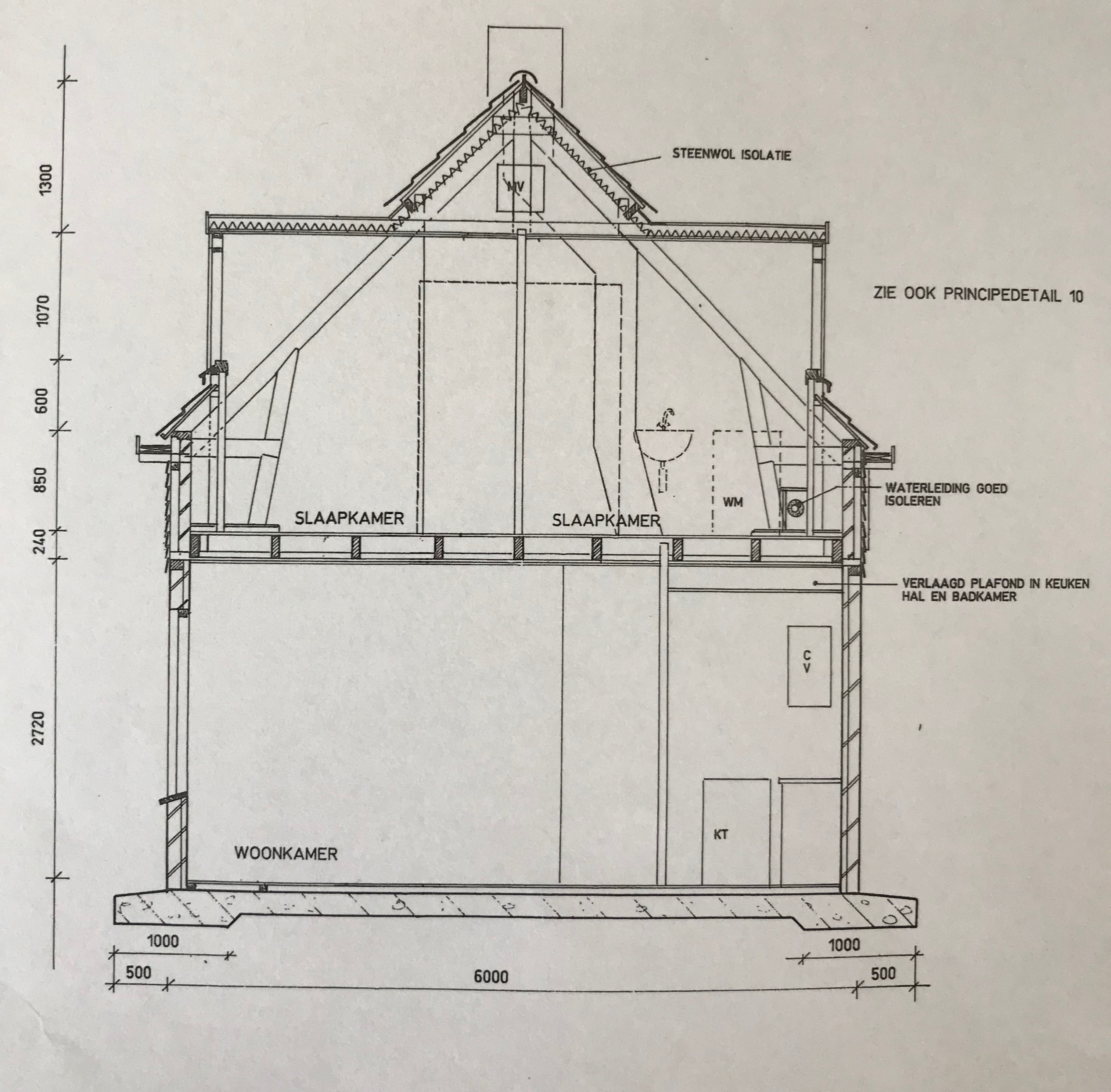 Bouwtekening woningtype A (hoogbouw) Vogeldorp